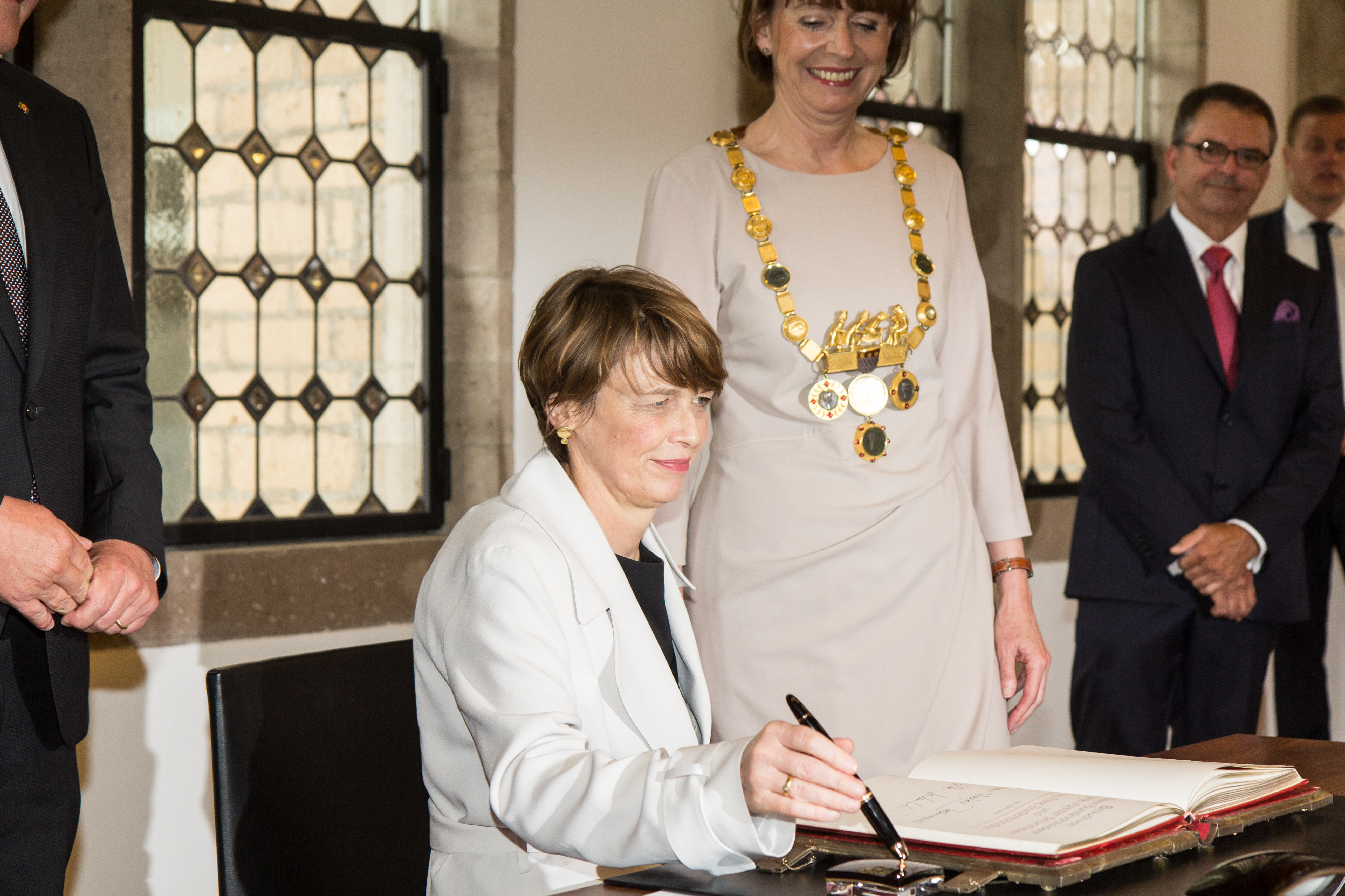 Anlässlich des gemeinsamen Festakts und eines Benefizkonzertes zum 175-jährigen Bestehen des Zentral-Dombau-Vereins zu Köln und des Kölner Männer-Gesang-Vereins besucht Bundespräsident Frank-Walter Steinmeier und seine Ehefrau Elke Büdenbender am 24. Juni 2017 Köln. Bei einem Empfang im Rathaus durch Oberbürgermeisterin Henriette Reker am Nachmittag sind als Vertreter des Landes Nordrhein-Westfalen der Landesfinanzminister Norbert Walter-Borjans anwesend, sowie zahlreiche Vertreterinnen und Vertreter zivilgesellschaftlichen Engagements, z.B. Initiatoren der Initiativen „Köln stellt sich quer“, „Mir all sin Kölle“ und „Arsch huh“ sowie Vertreter des gesellschaftlichen und religiösen Lebens wie z.B. Festkomitee des Kölner Karnevals von 1823 und Erzbistum Köln, Evangelischer Kirchenverband Köln und DITIB.